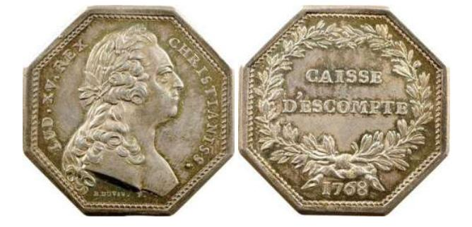 Jeton de la Caisse d'escompte (1767-1769). Argent : 14,80 g - Dim. : 33 mm.